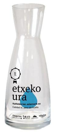 Txorrotako ura zerbitzatzeko kristalezko pitxerra, Uraren Euskal Agentziak sustatutako Etxeko Ura kanpainakoa.